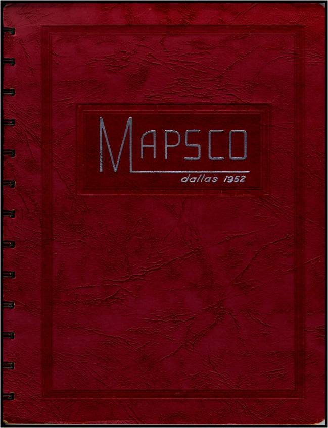 1952 Dallas Mapsco Cover